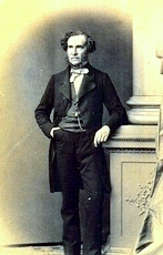 Scan eines alten Familienporträts von Jules André Joseph de Grand Ry (1805-1876), Besitzer von Schloss Lontzen